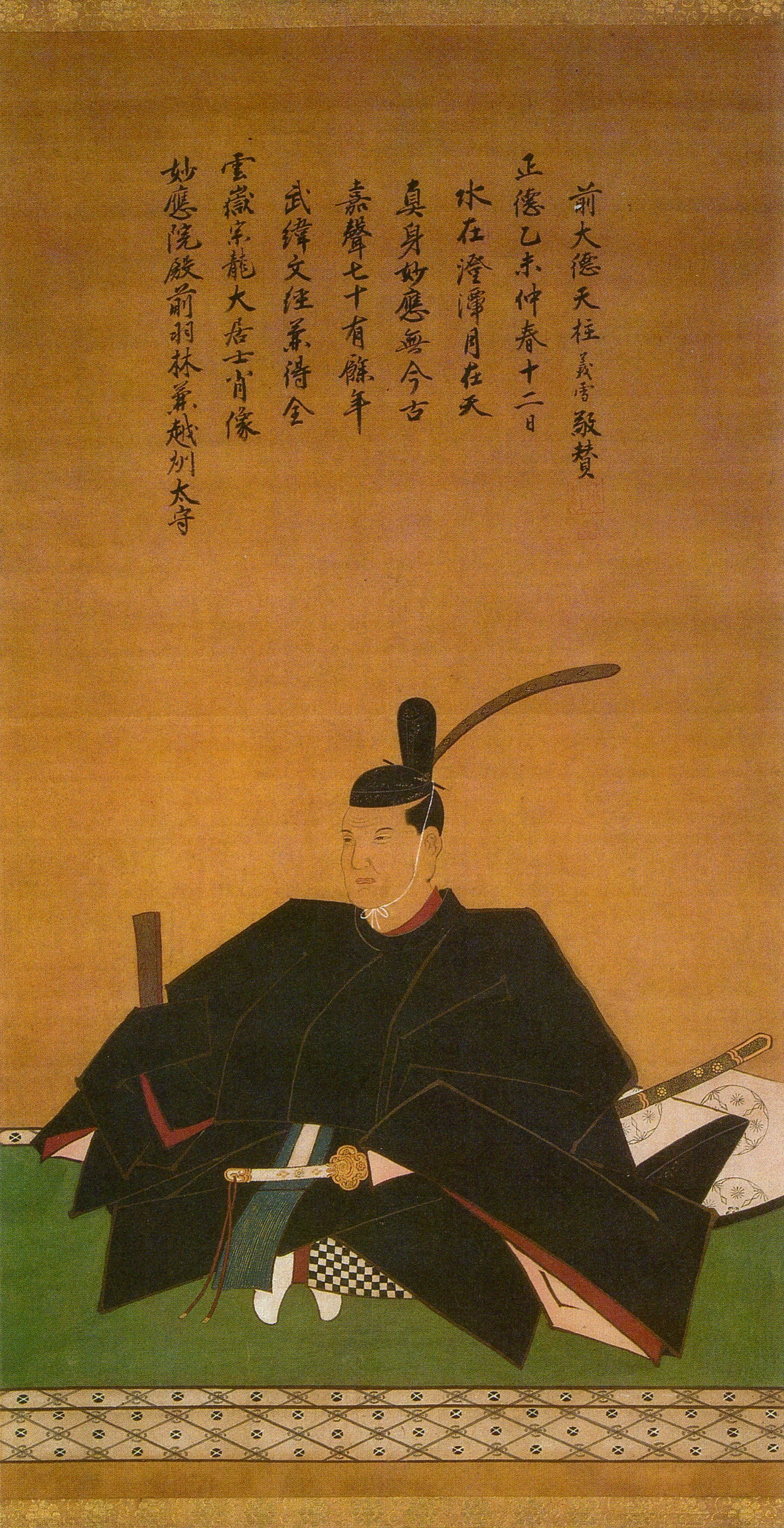 肥後熊本藩3代藩主・細川綱利の肖像画。